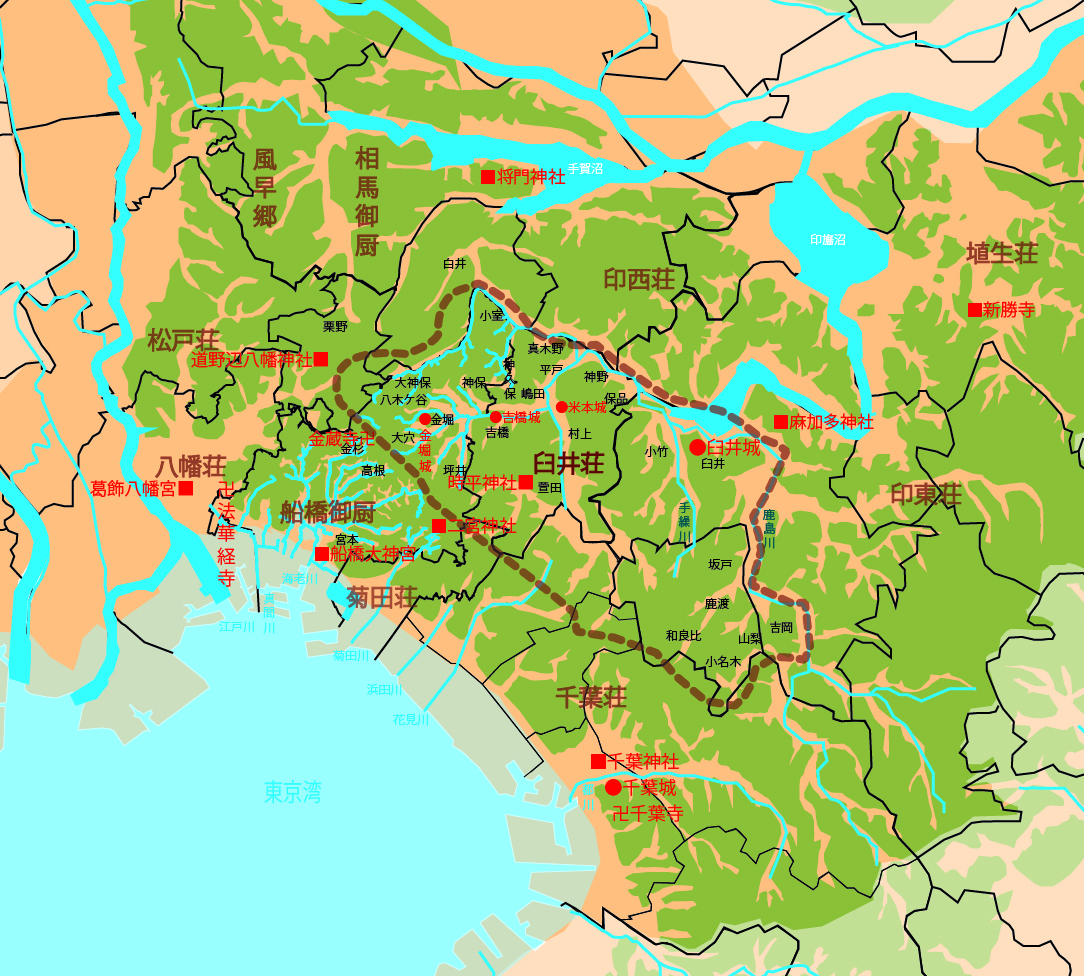 2017年度に行われた企画展示（源綱清と龍牙城～戦国時代の八千代～）の解説書資料を参考に作者が作成した臼井荘（庄）の配置を示した図。